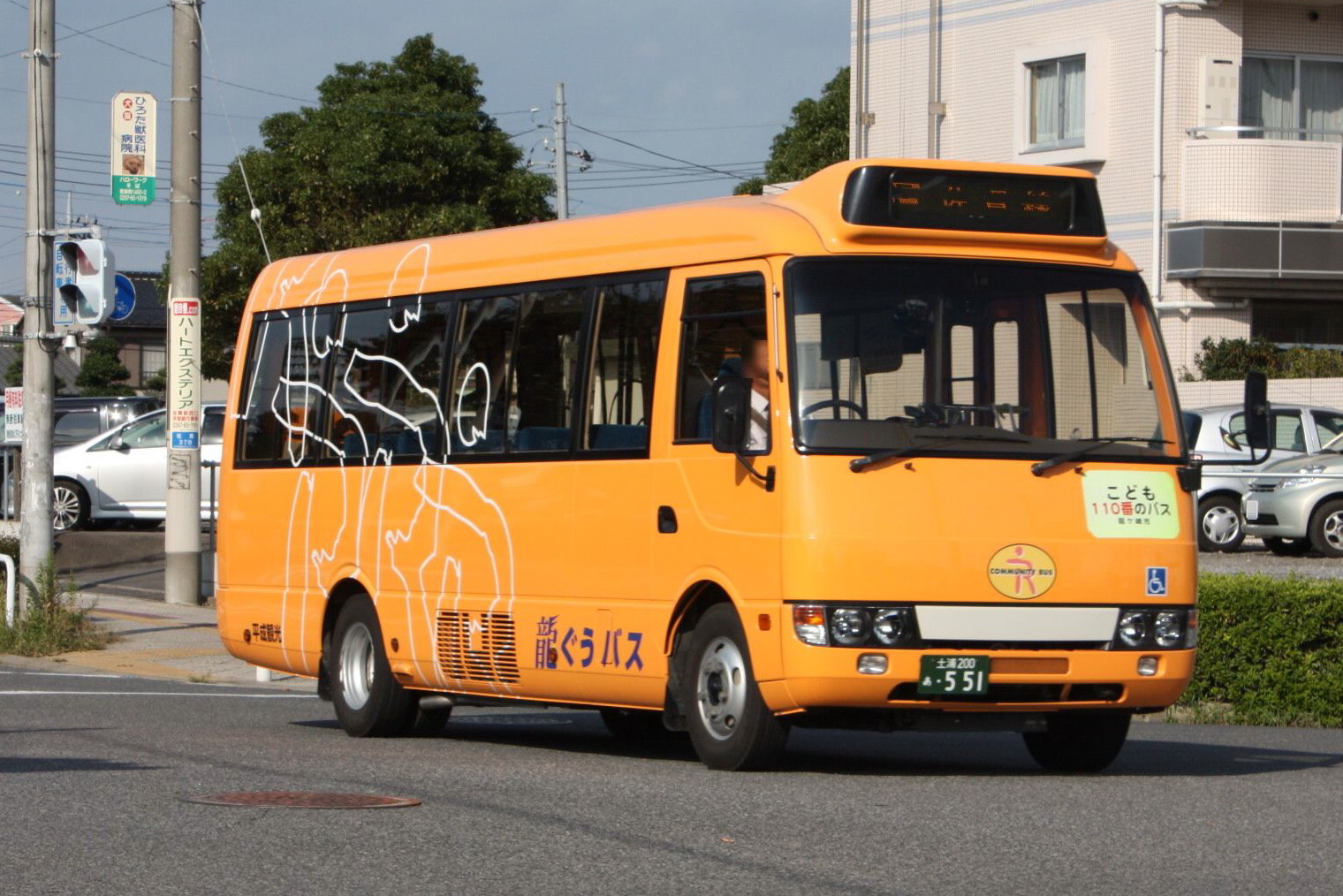 龍ぐうバス 佐貫駅付近にて